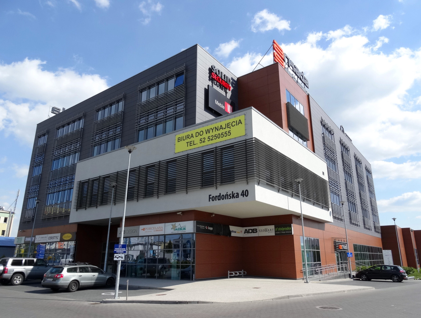 Galeria wnętrz Arkada przy ul. Fordońskiej w Bydgoszczy